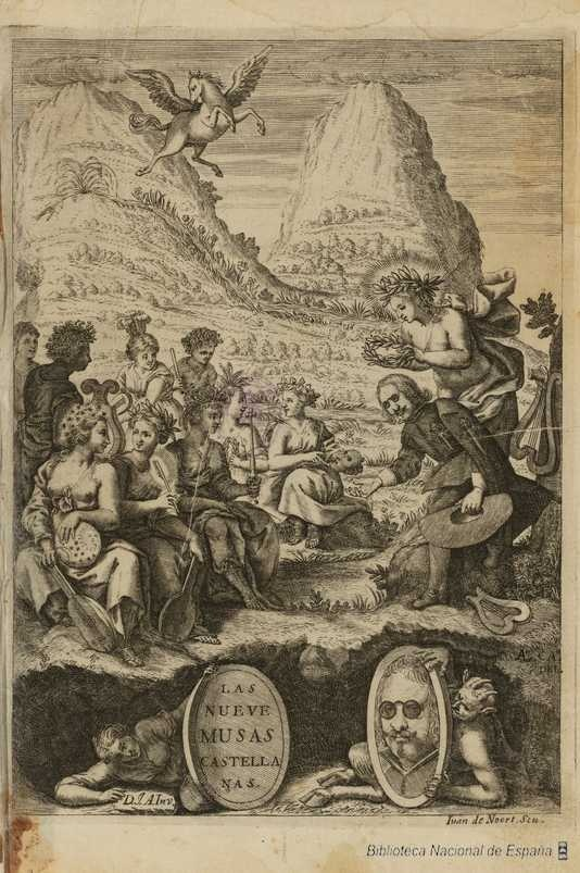 Grabado calcográfico de Francisco de Quevedo, El Parnaso español